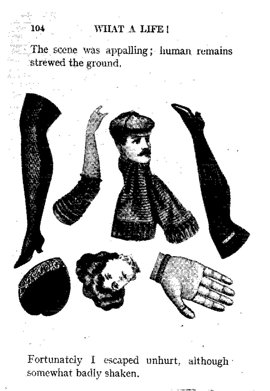 Page 104 du roman-collage What a life ! de l'écrivain Edward Verrall Lucas et de l'illustrateur George Morrow (1911).